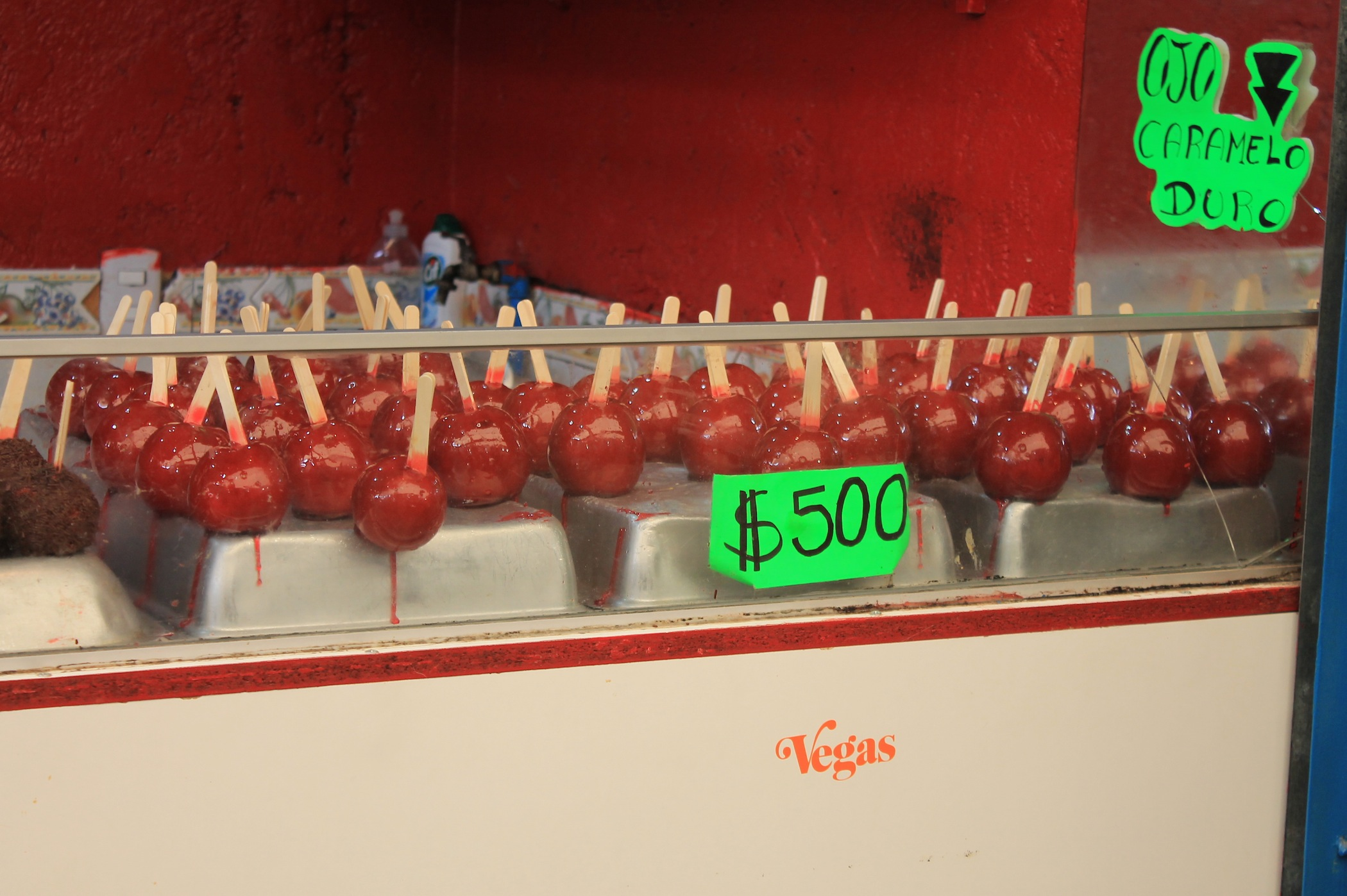 Manzana confitada en carro. Algarrobo, Chile.